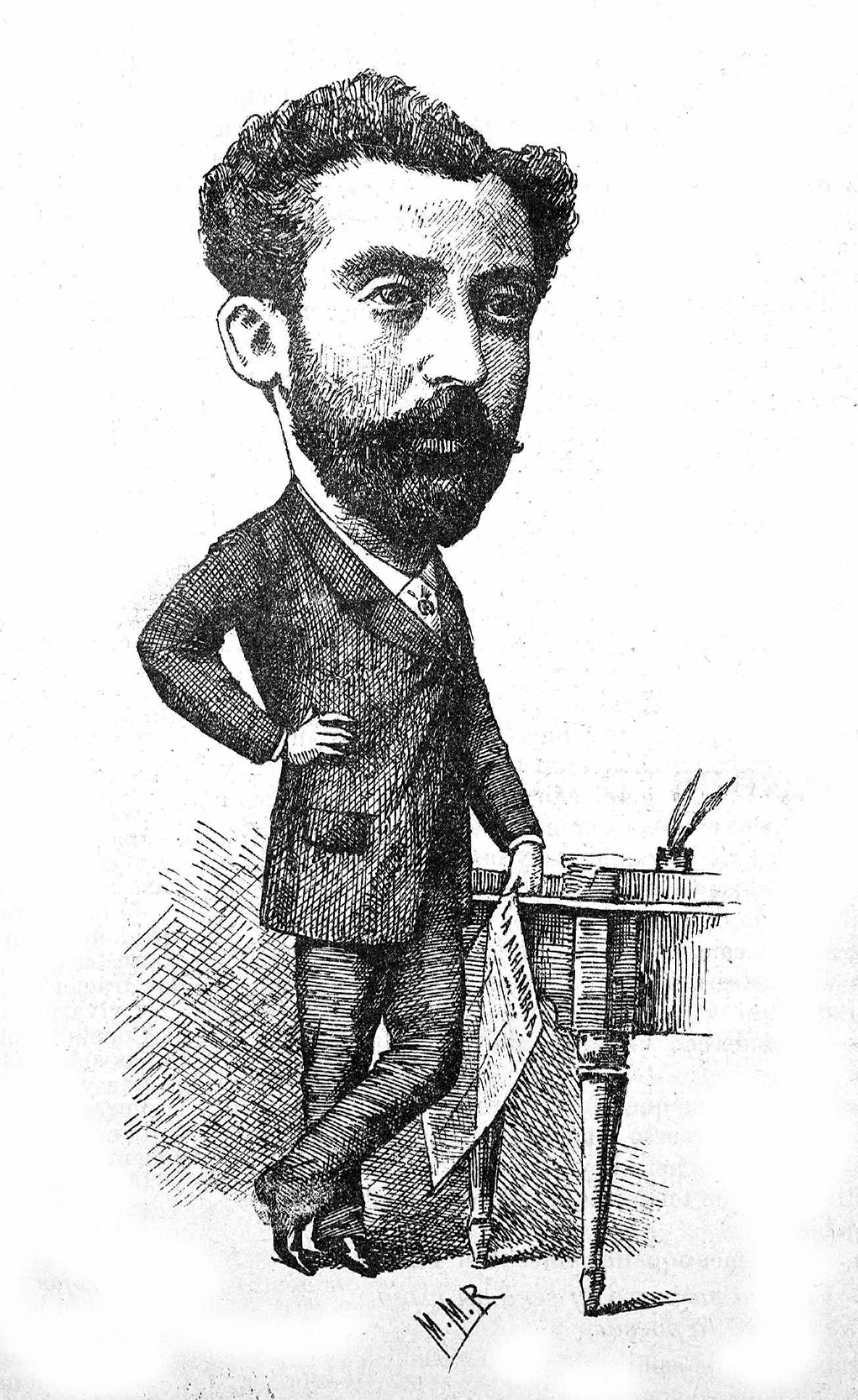 Caricatura de Francisco de Paula Valladar publicada en Mefistófeles : Semanario satírico ilustrado número 11, 1 de junio de 1889